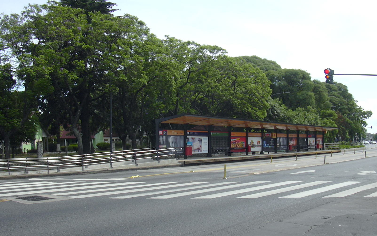 Andén norte de la estación Cortina del metrobus de Buenos Aires, visto desde el sudoeste